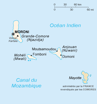 Carte des Comores (francisée) - Historique de la carte originale Image:Cn-map.JPG (suppr) (actu) 7 janvier 2005 à 17:21 . . Siren . . 330x355 (27370 octets) (Carte des Comores (francisée))